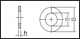 DIN 1440